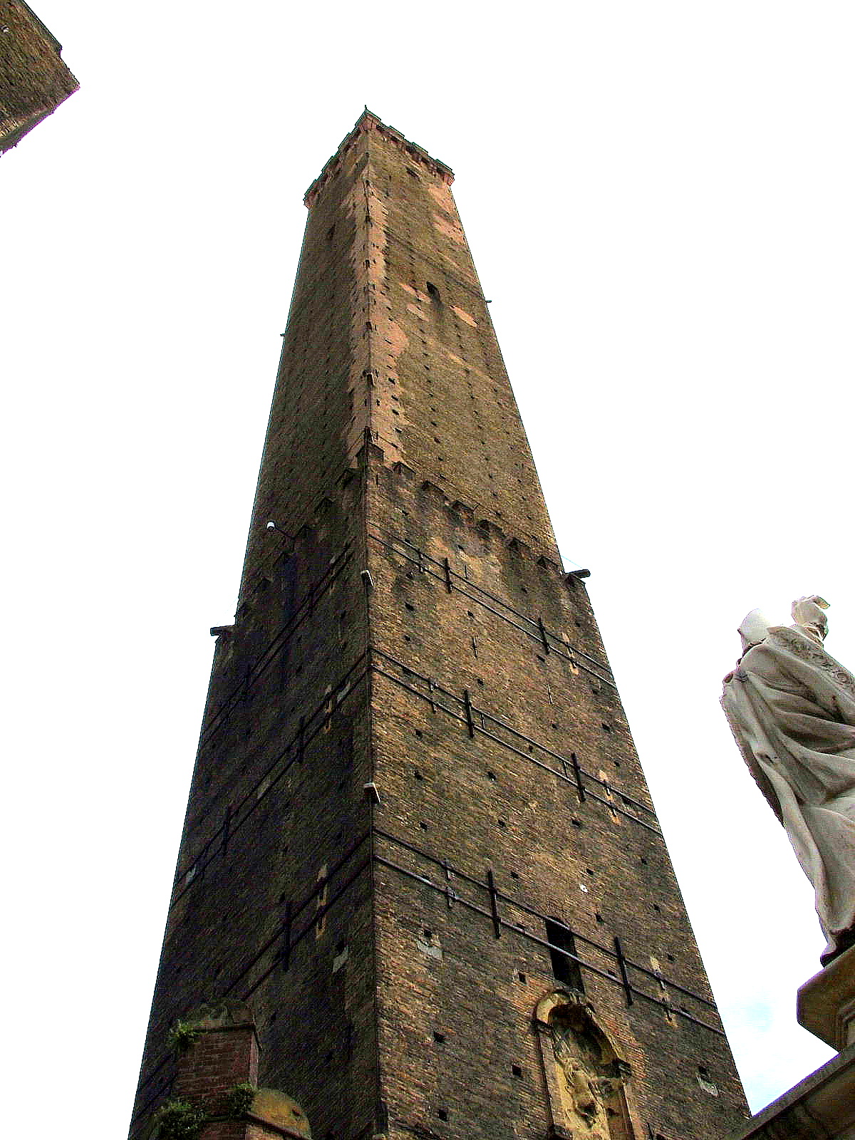 Bologna, la Torre degli Asinelli con la statua a San Petronio